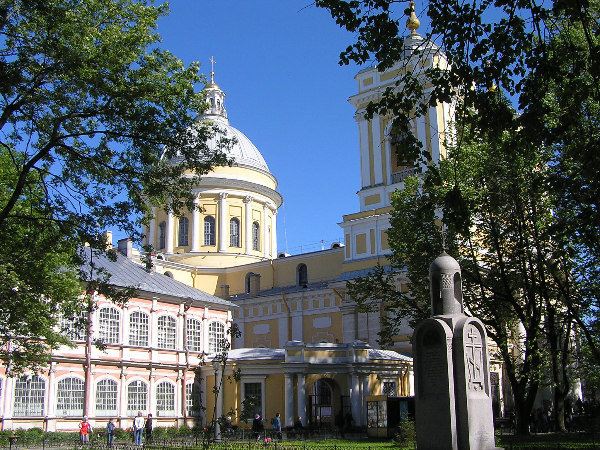 Alexander_Nevskij Kloster Sankt Petersburg/Russland